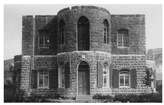 בית התפילה בעדסייה